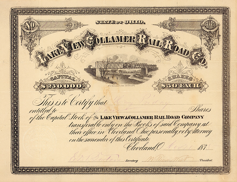 Share of the Lake View & Collamer Railroad Co. from the 26. November 1878